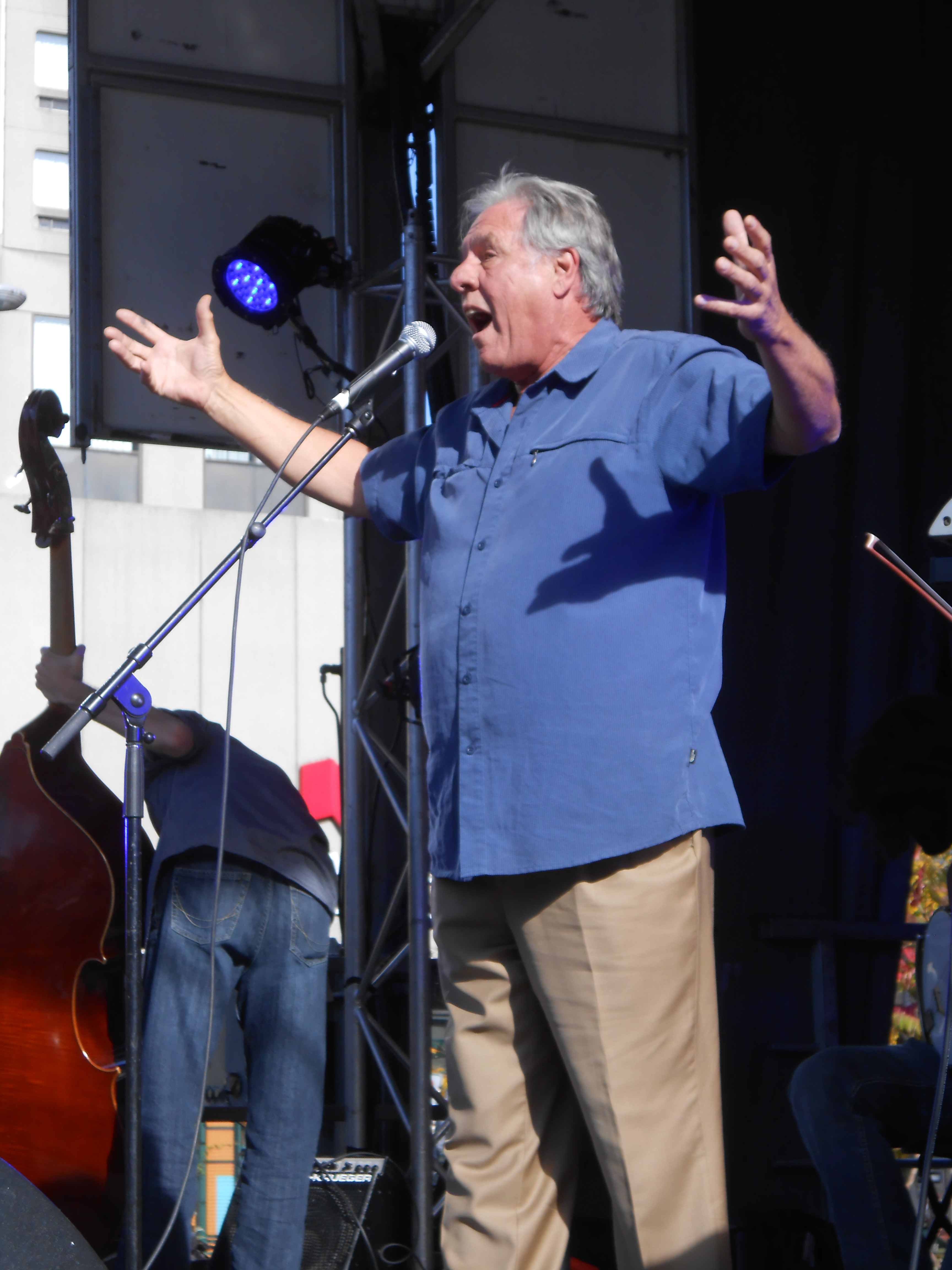 Pierre Curzi livrant un discours indépendantiste à la Place Émilie-Gamelin, à Montréal